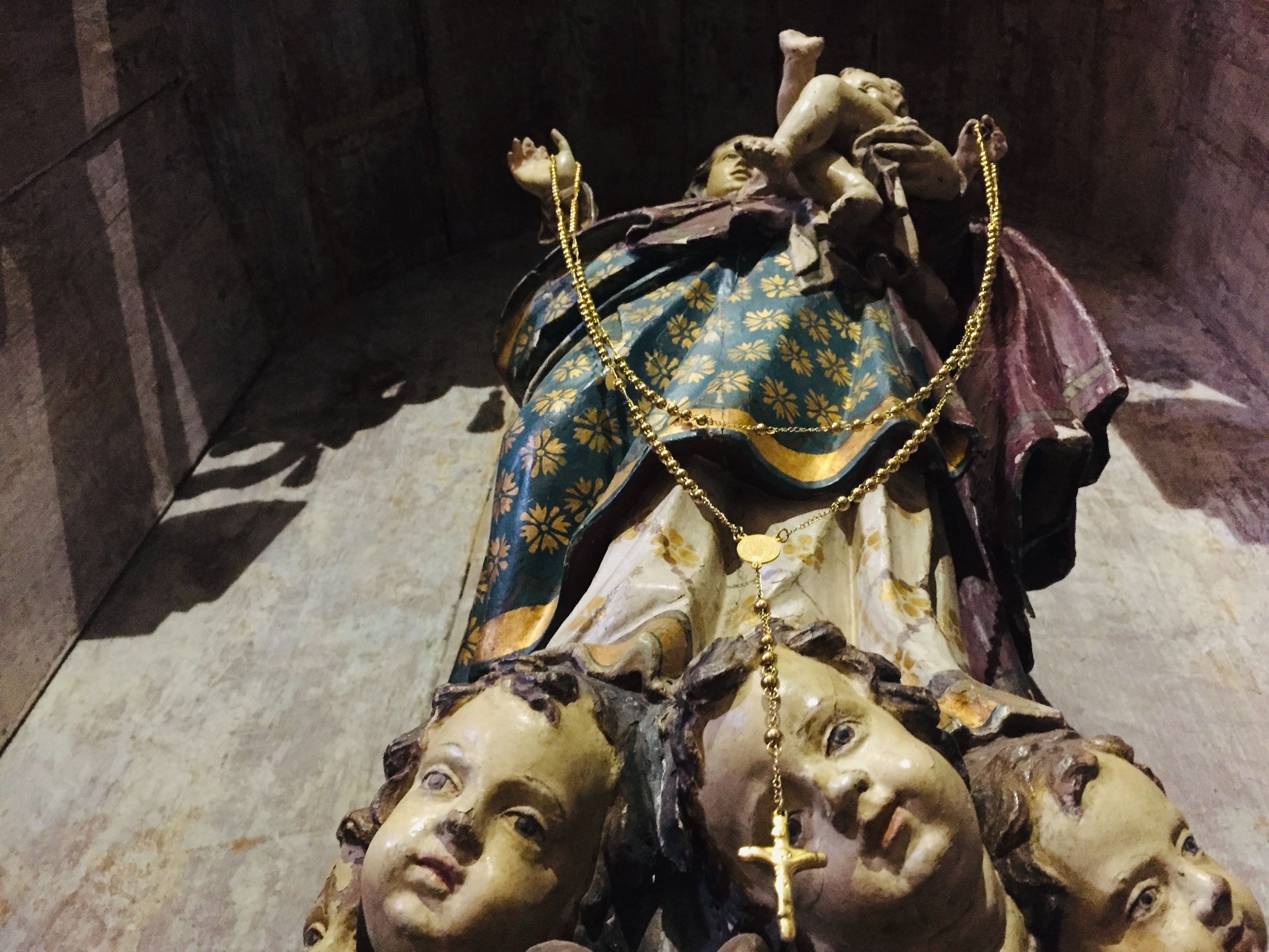 Nossa Senhora do Rosário dos Pretos de Pirenópolis, peça do século XVIII